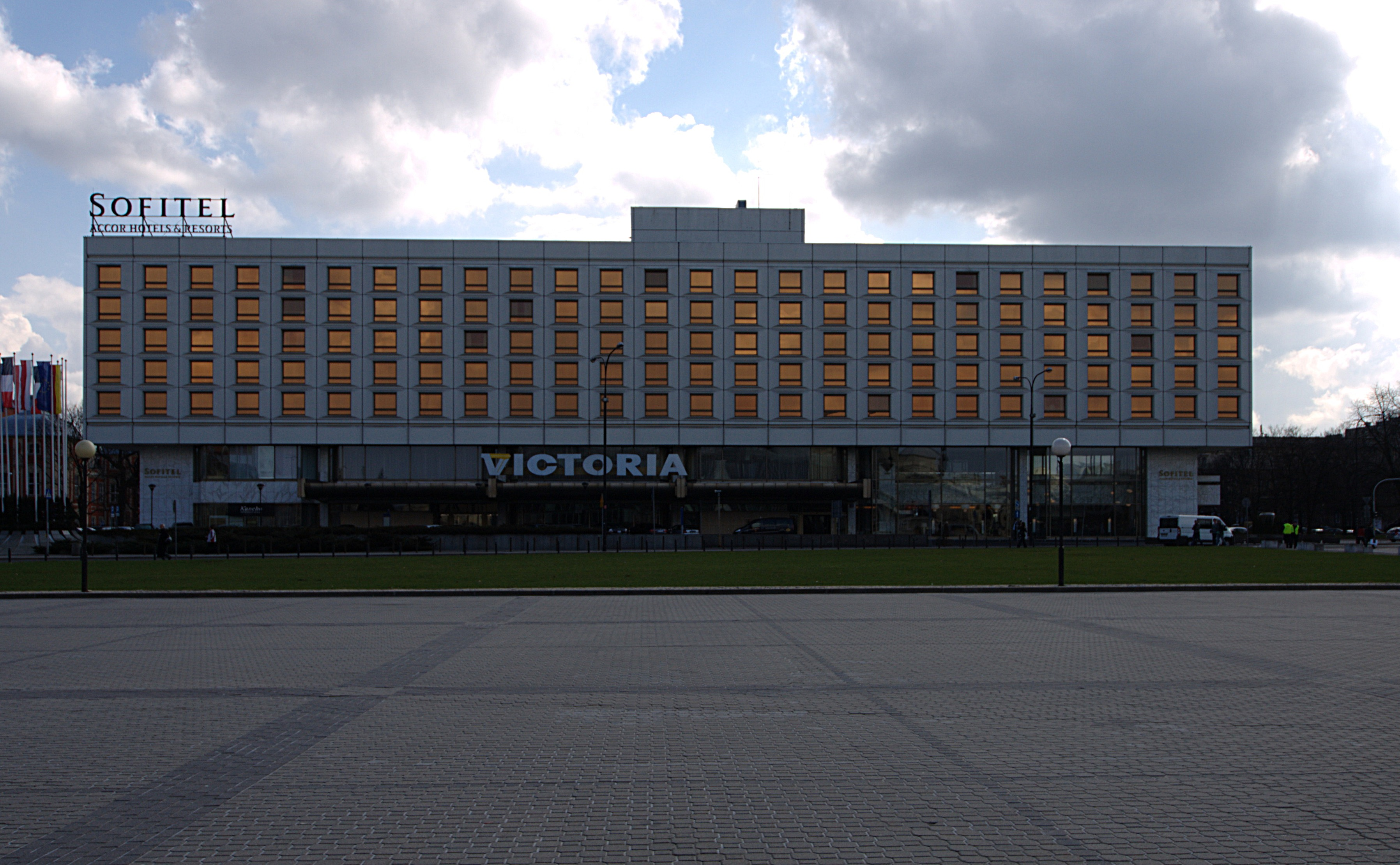 Hotel Sofitel Victoria Warszawa